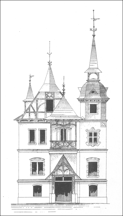 Berlin, Villa Haukohl